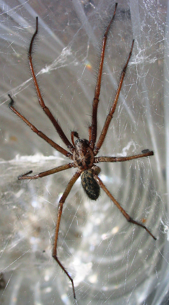 Beschreibung: Hausspinne - Große Winkelspinne (Tegenaria atrica)